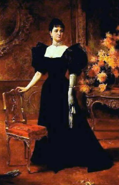 Colección privada de Carmen Luisa Pérez Matos de Sardi.